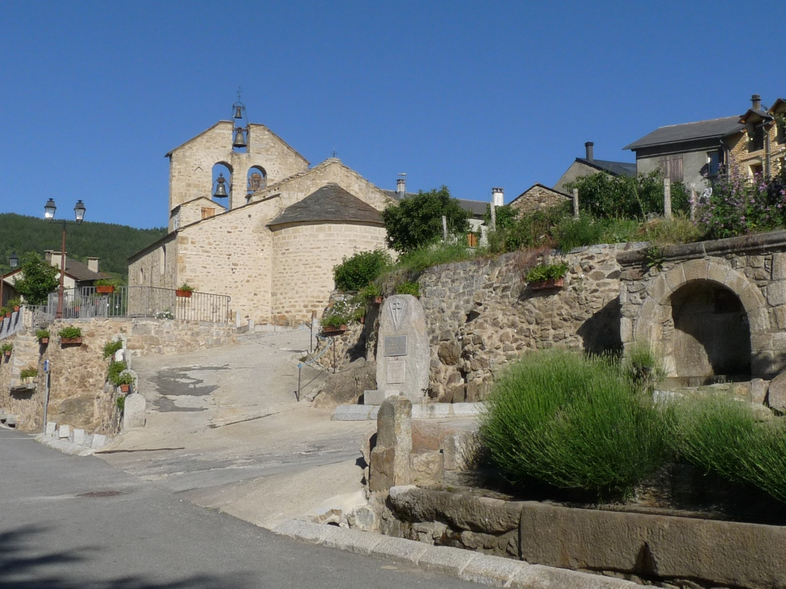 Eglise et centre de Dorres, P.O., France